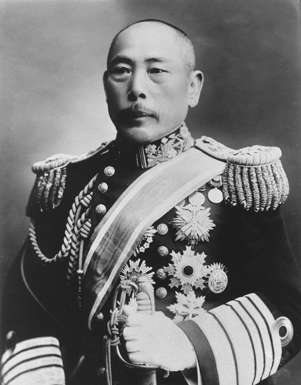 Portrait of Kamimura Hikonojo (上村彦之丞, 1849 – 1916)